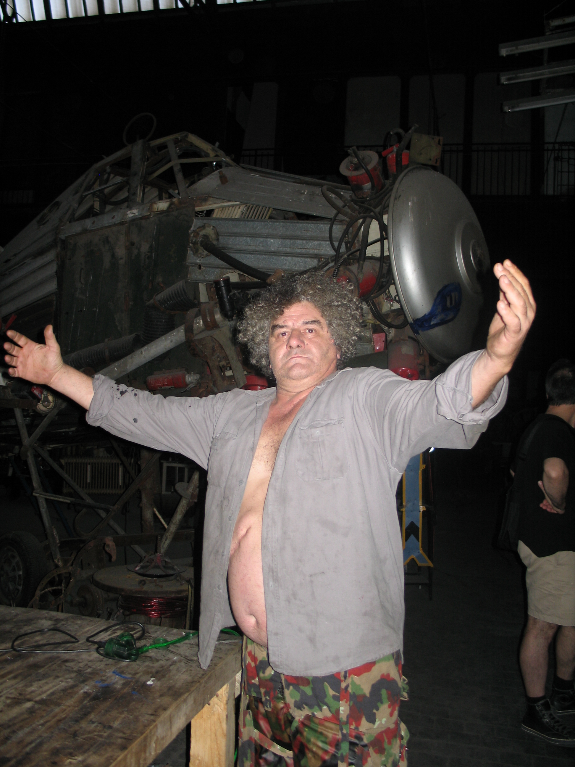 Carlos Regazzoni in zijn werkruimte in de Halle Pajol in Parijs,juli 2005